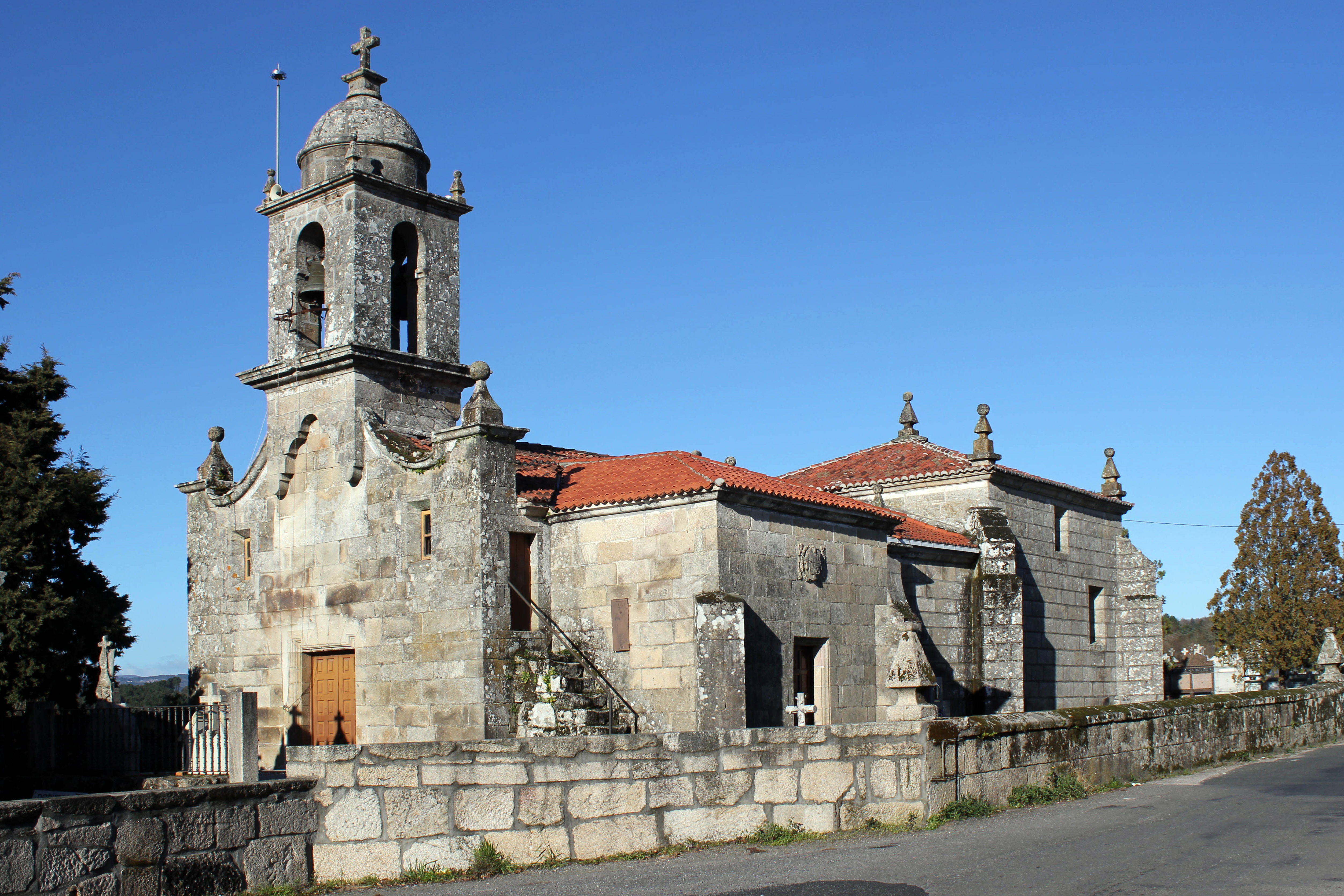 Igrexa de Santiago de Parada de Amoeiro, no concello da Amoeiro.